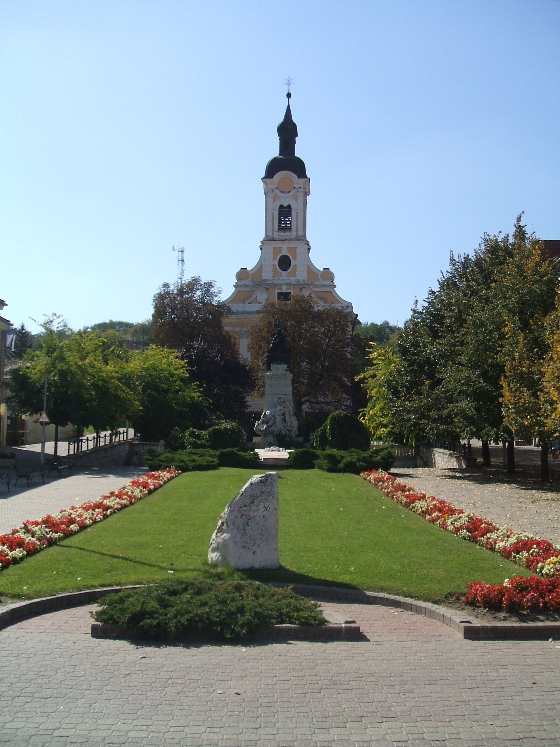 Dorog, Szent József római katolikus templom